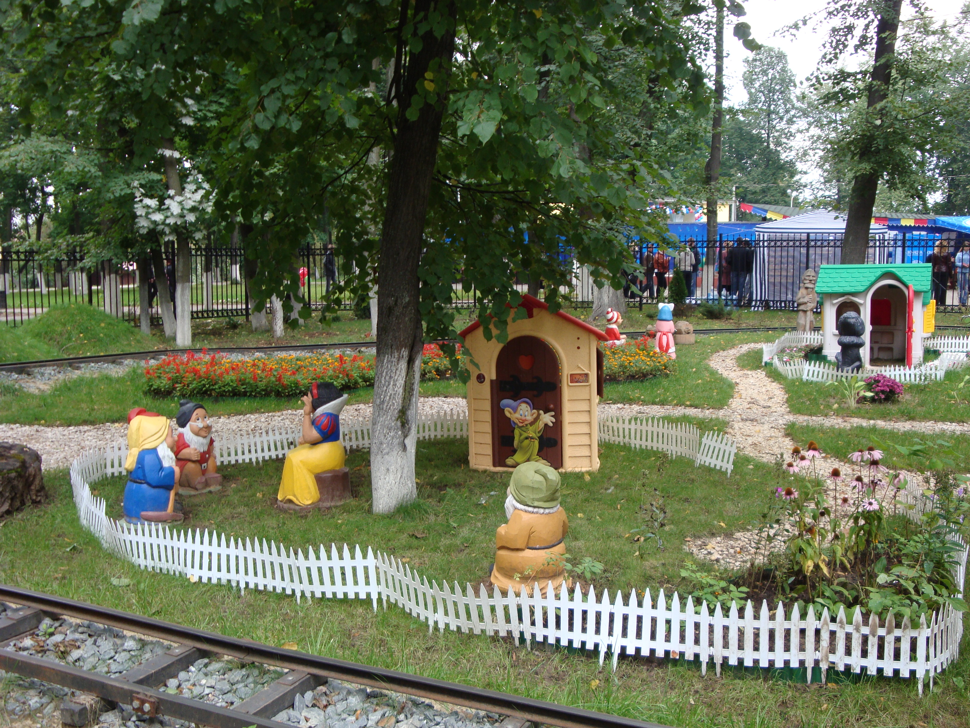 Детская железная дорога в Городском парке им. Талалихина в Подольске (Московская область)